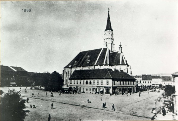 Kolozsvár Fő tere 1880-ban